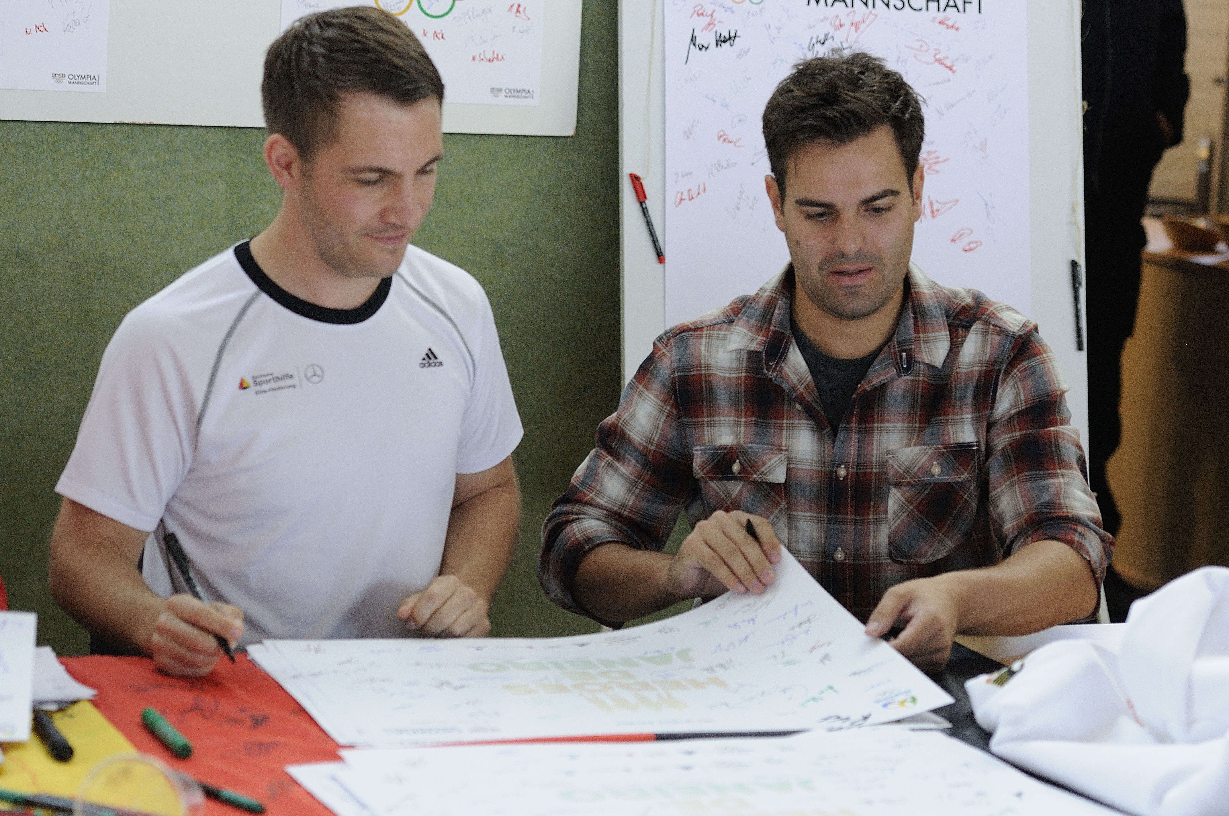 Bild aufgenommen in Hannover während der Einkleidung der deutschen Olympiamannschaft 2016. Henri Junghänel und Julian Justus.